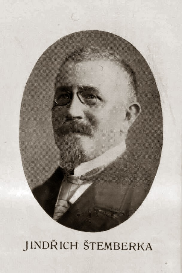 Jindřich Štemberka (1867 - 1926), Český a rakouský právník.